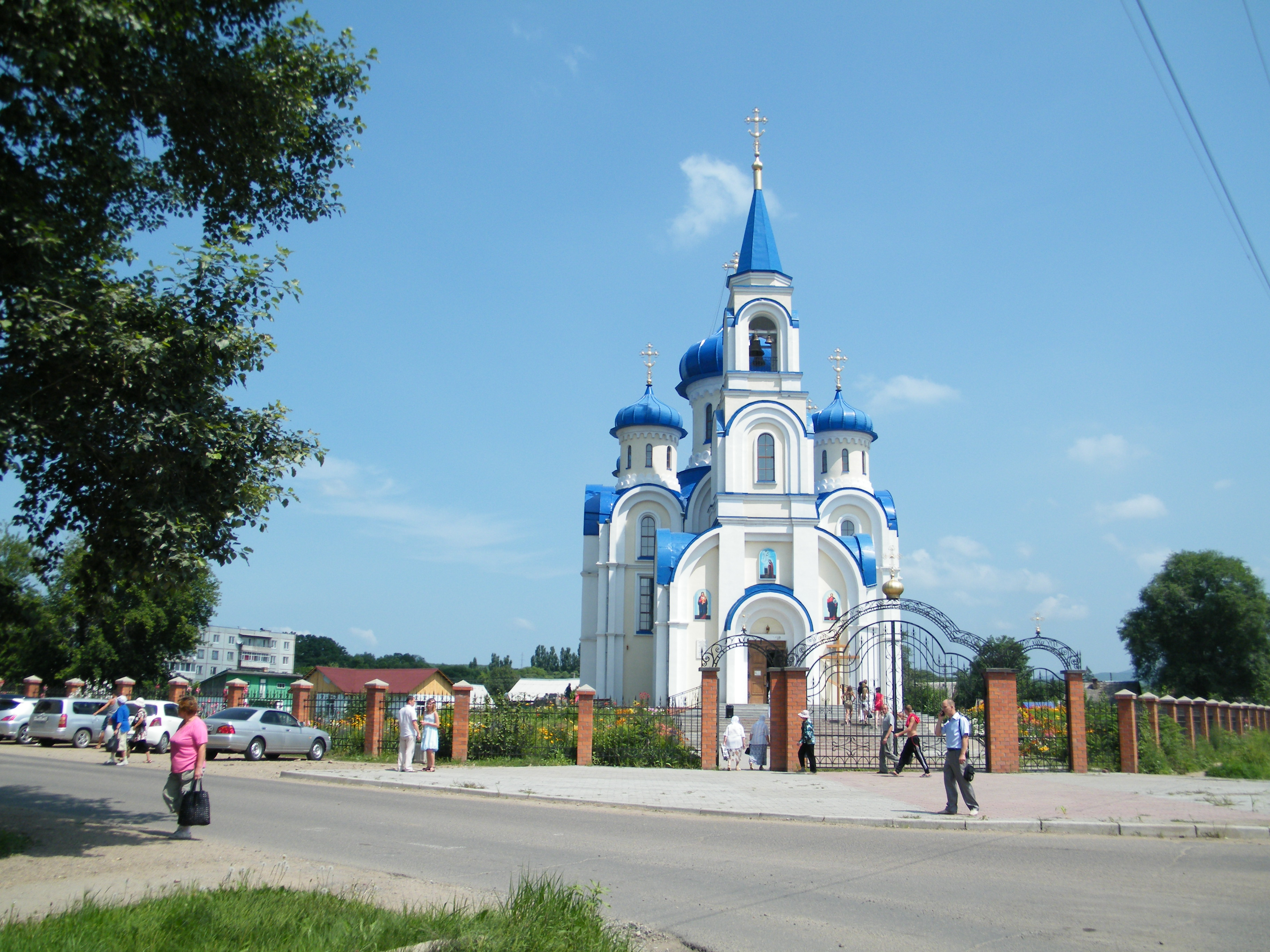 Город Арсеньев, Благовещенский храм.